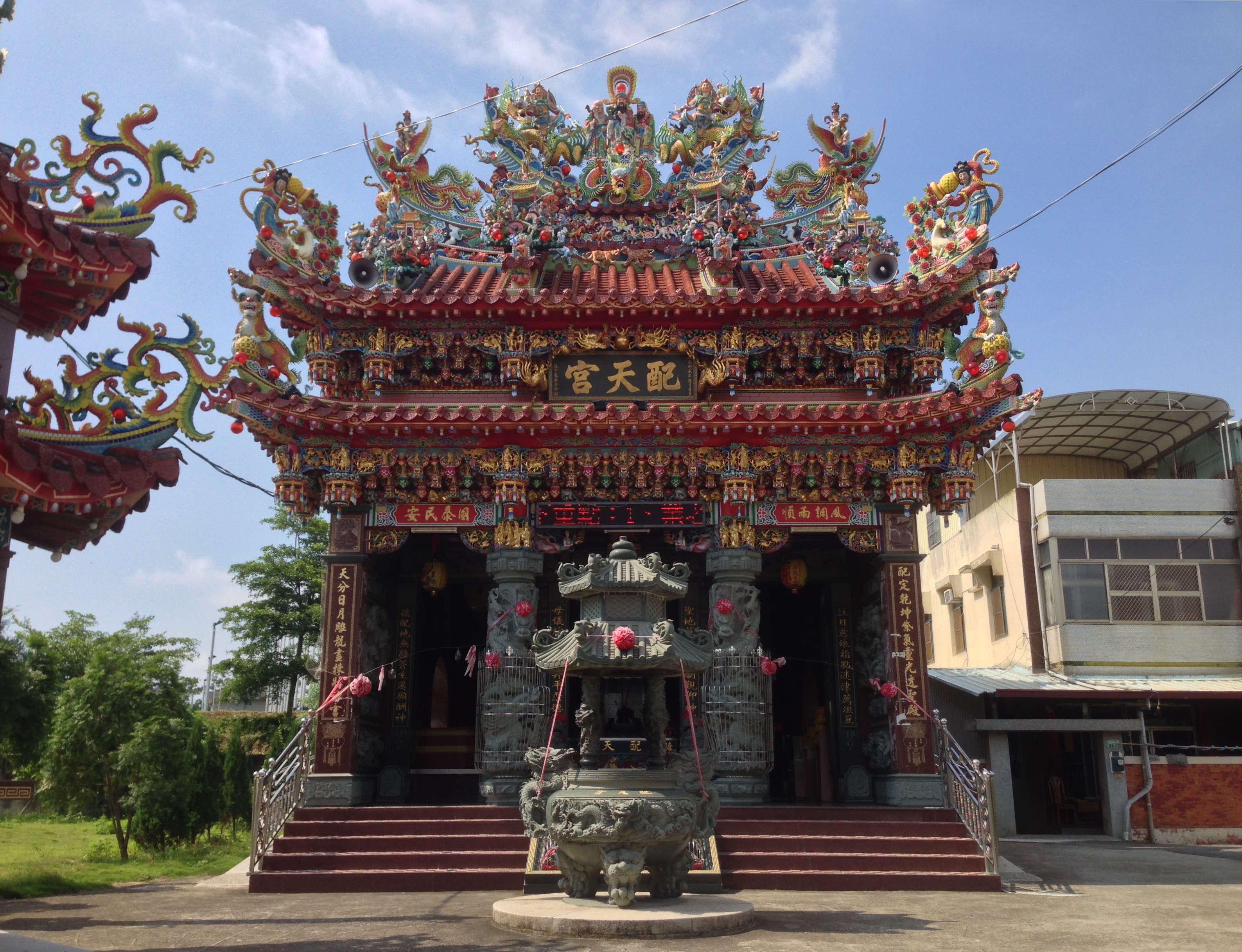 糖廠配天宮